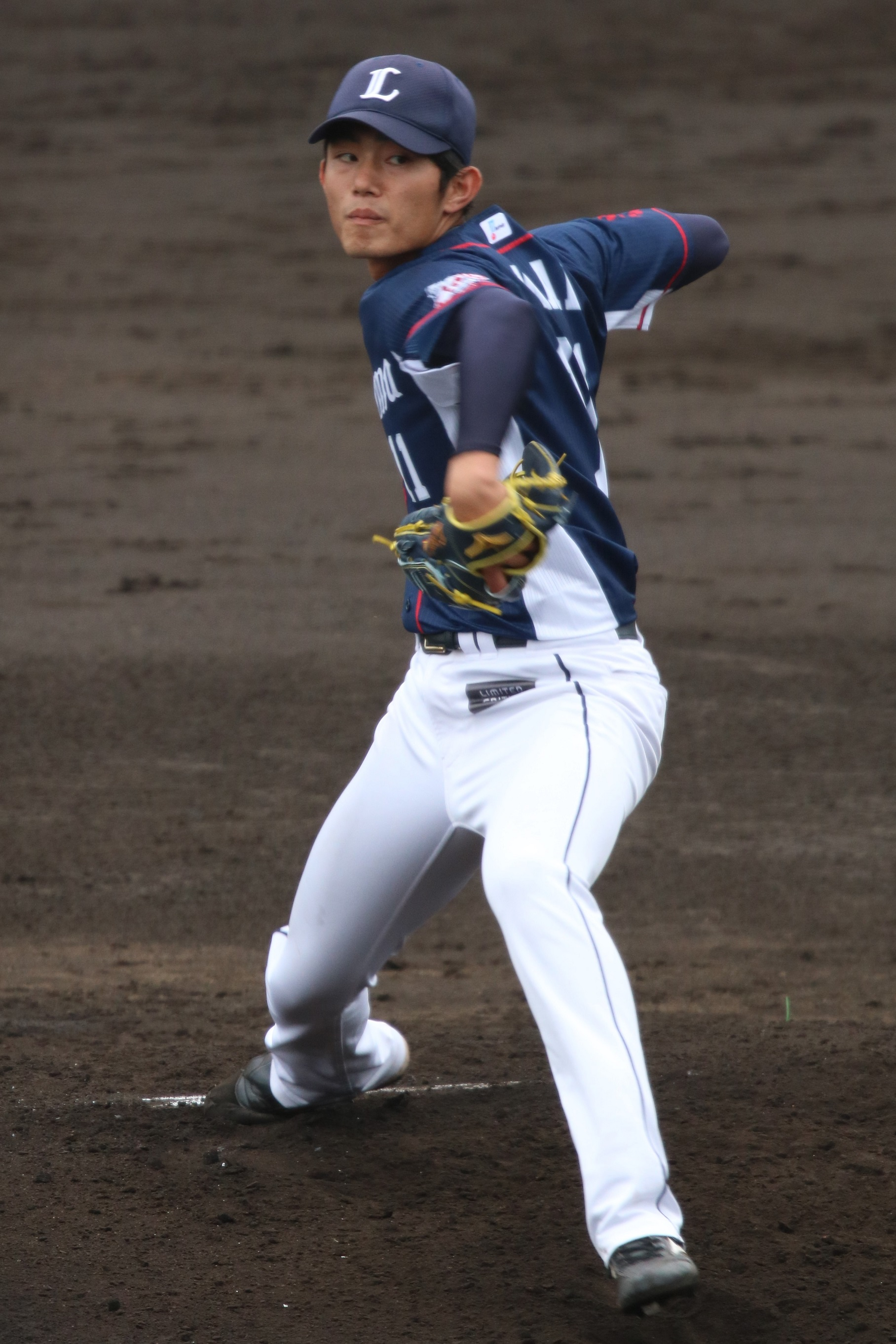 2017/11/13 vs侍ジャパン